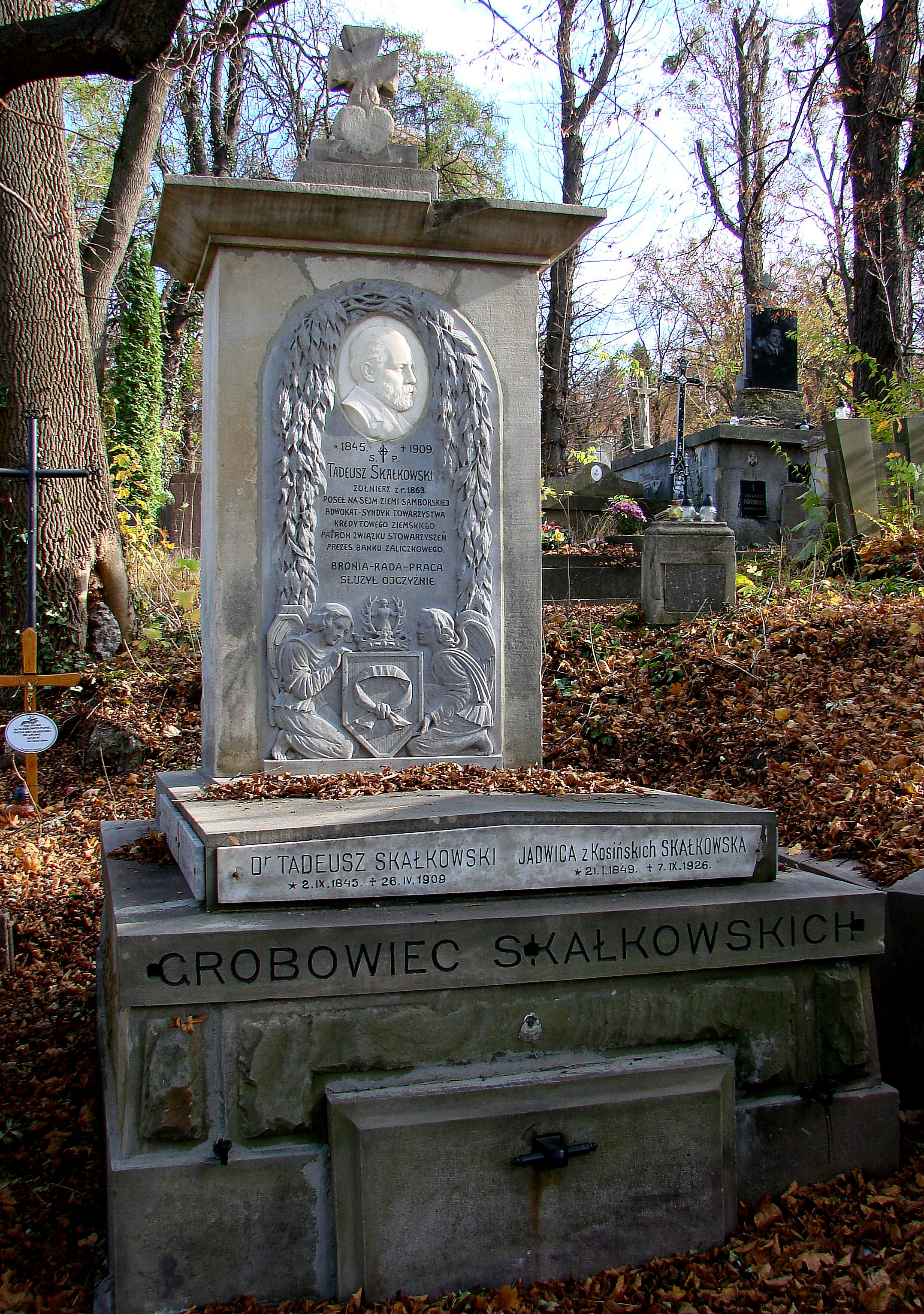 Гробівець родини Скалковських.Личаківський цвинтар , поле № 59.